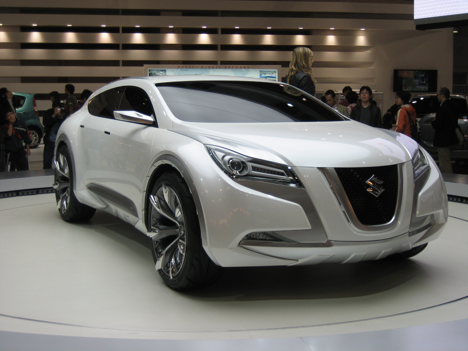 Suzuki Kizashi2 in Tokyo motor show 2007